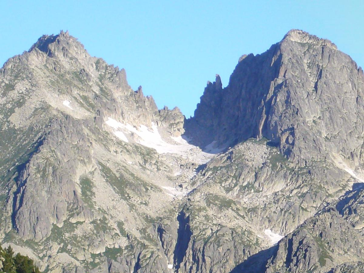 Coll d'Harlé vist des de la Vall de Colieto; la Vall de Boí, Alta Ribagorça, Catalunya